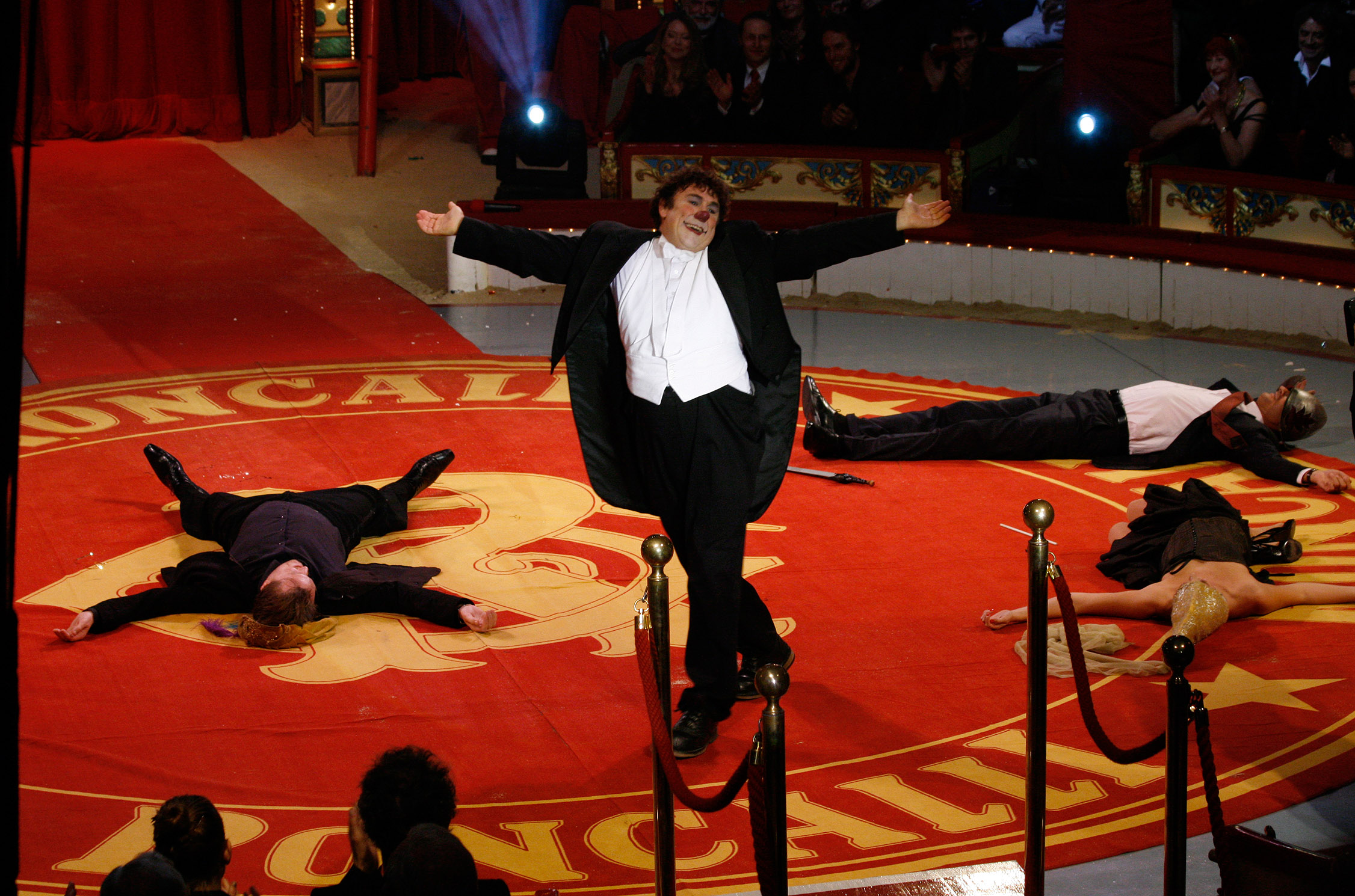 Andreas Mailath-Pokorny, Nicholas Ofczarek und Bettina Mönch mit dem Clown David Larible während der Verleihung des Nestroy-Theaterpreises 2009 (Circus Roncalli auf dem Wiener Rathausplatz).